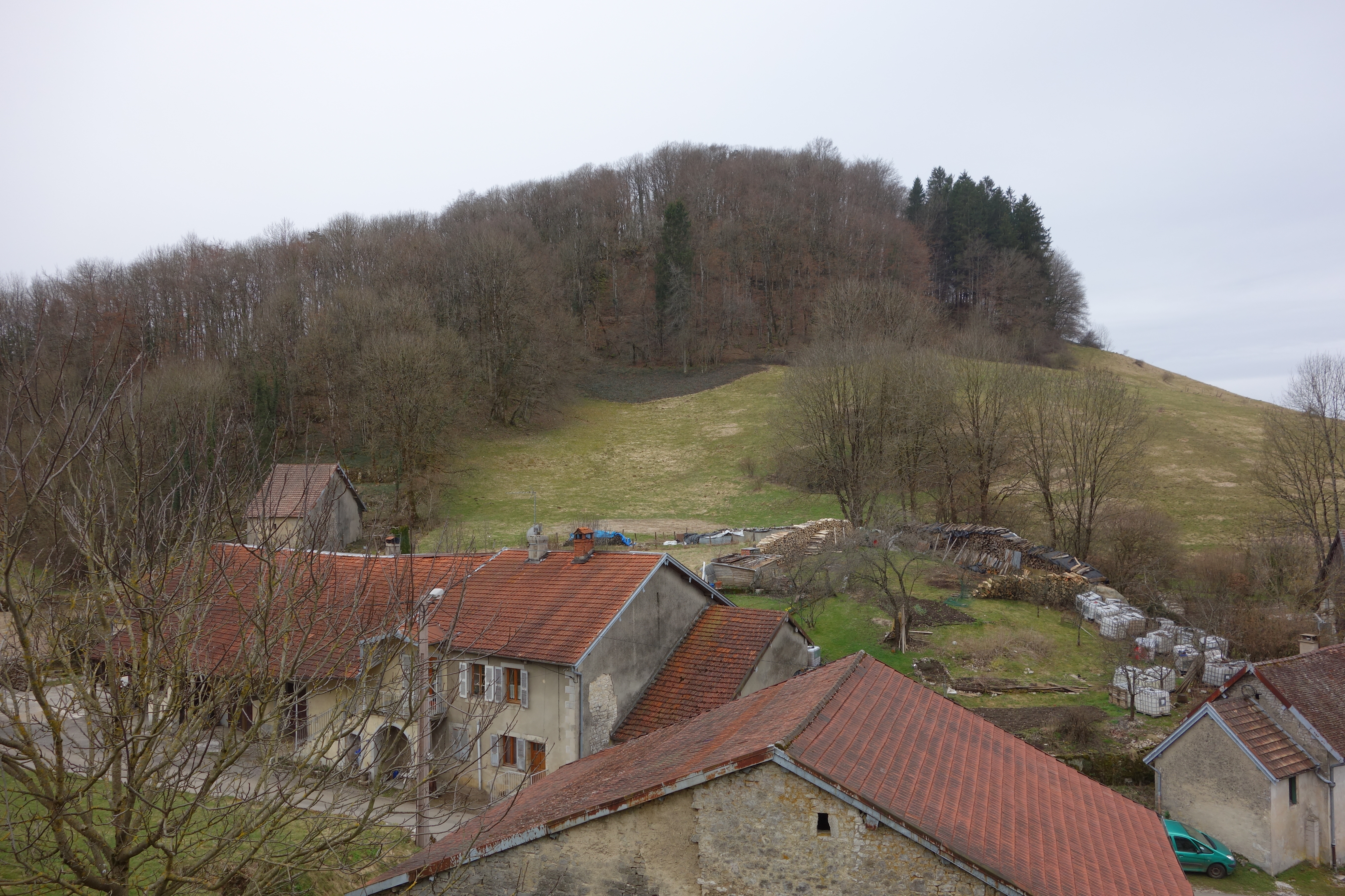 Montrond (Jura) - site de l'ancien château au sommet de la butte